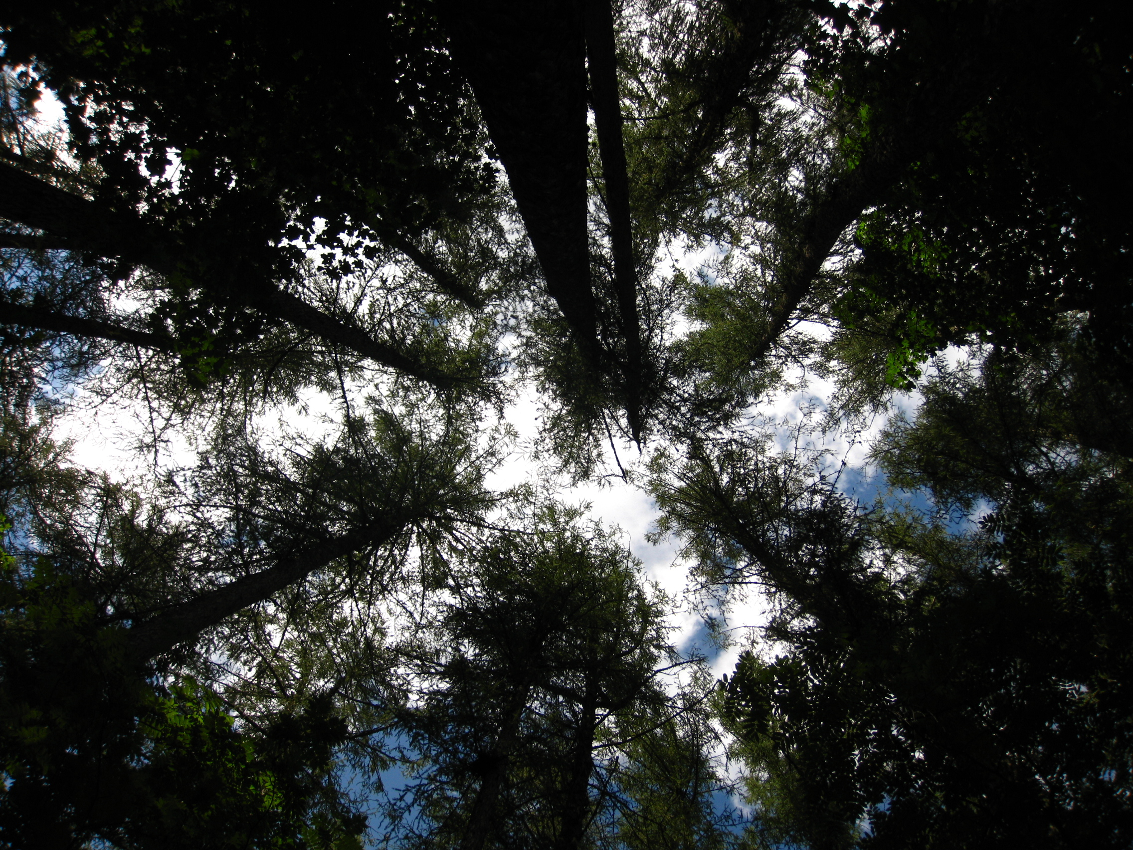 Loodi Püstmäe lehisepuistu lehised, Loodi LP